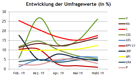 Europawahl 2019 Lettland Umfragen